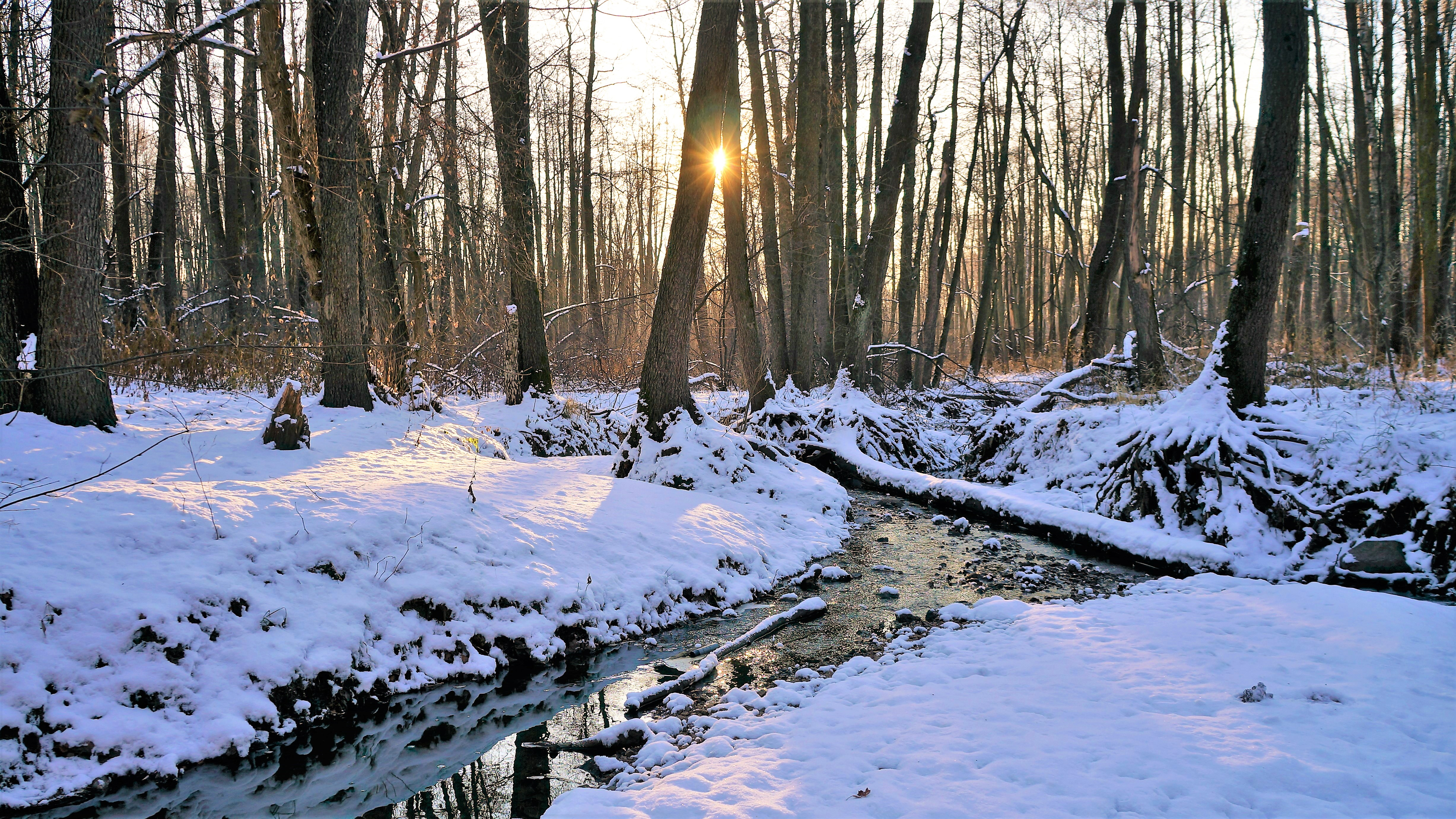 29 ноября 2018 года. Москва, Измайловский лесопарк, Липитинский ручей. Направление съёмки юг.